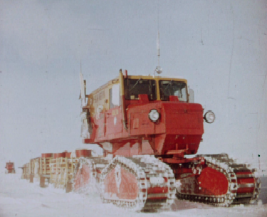 Sno-Cat utilizado en la primera expedición terrestre hecha por la Argentina al polo sur